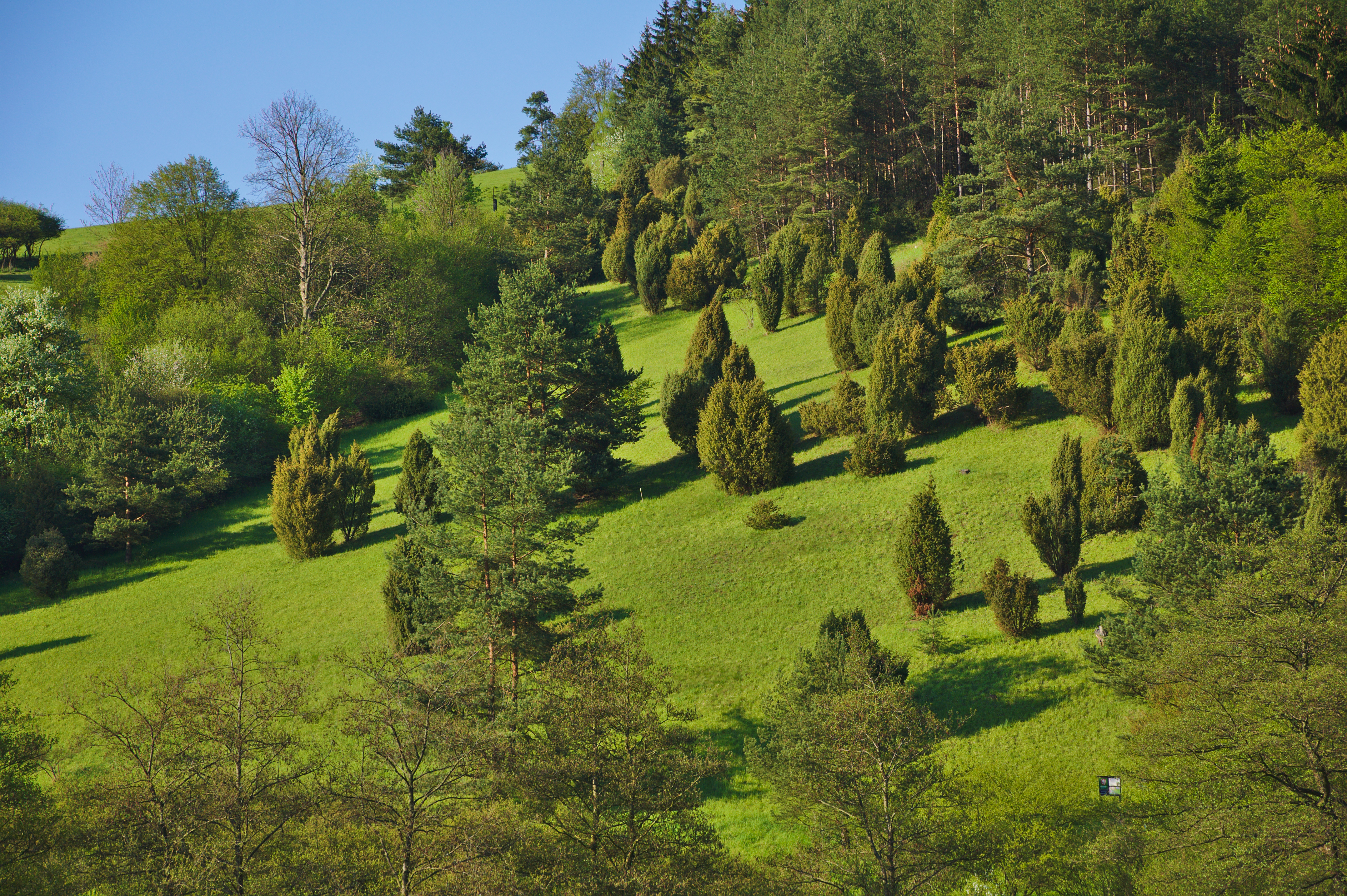 Přírodní památka U Hamrů, okres Žďár nad Sázavou